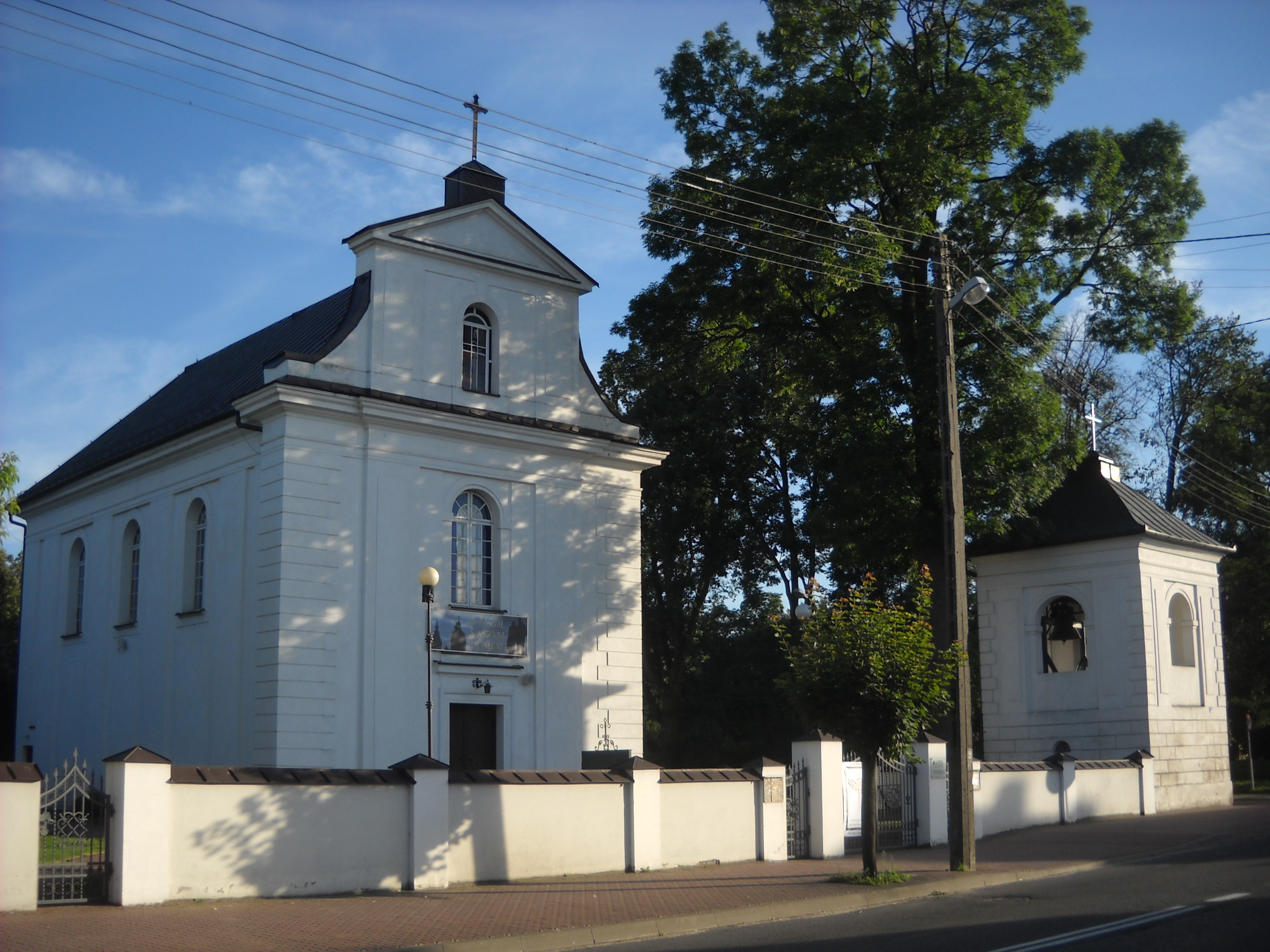 Kościół św. św. Piotra i Pawła w Międzyrzecu Podlaskim, dawna cerkiew unicka, a następnie prawosławna